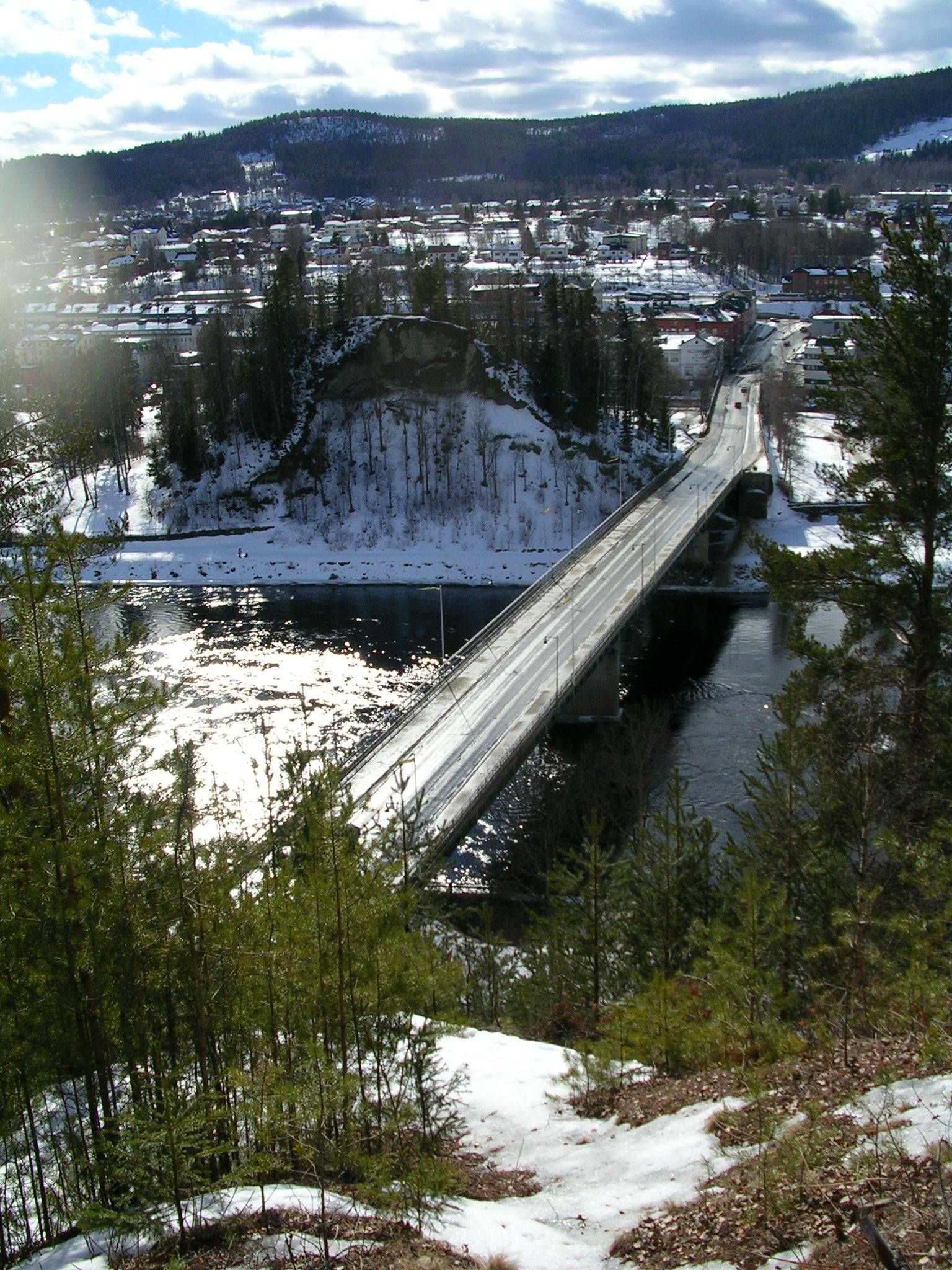 en bild av sollefteå i norra sverige